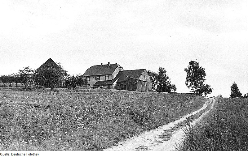 Original image description from the Deutsche Fotothek Malschwitz-Gleina. Ehem. Windmühlengehöft, Ansicht